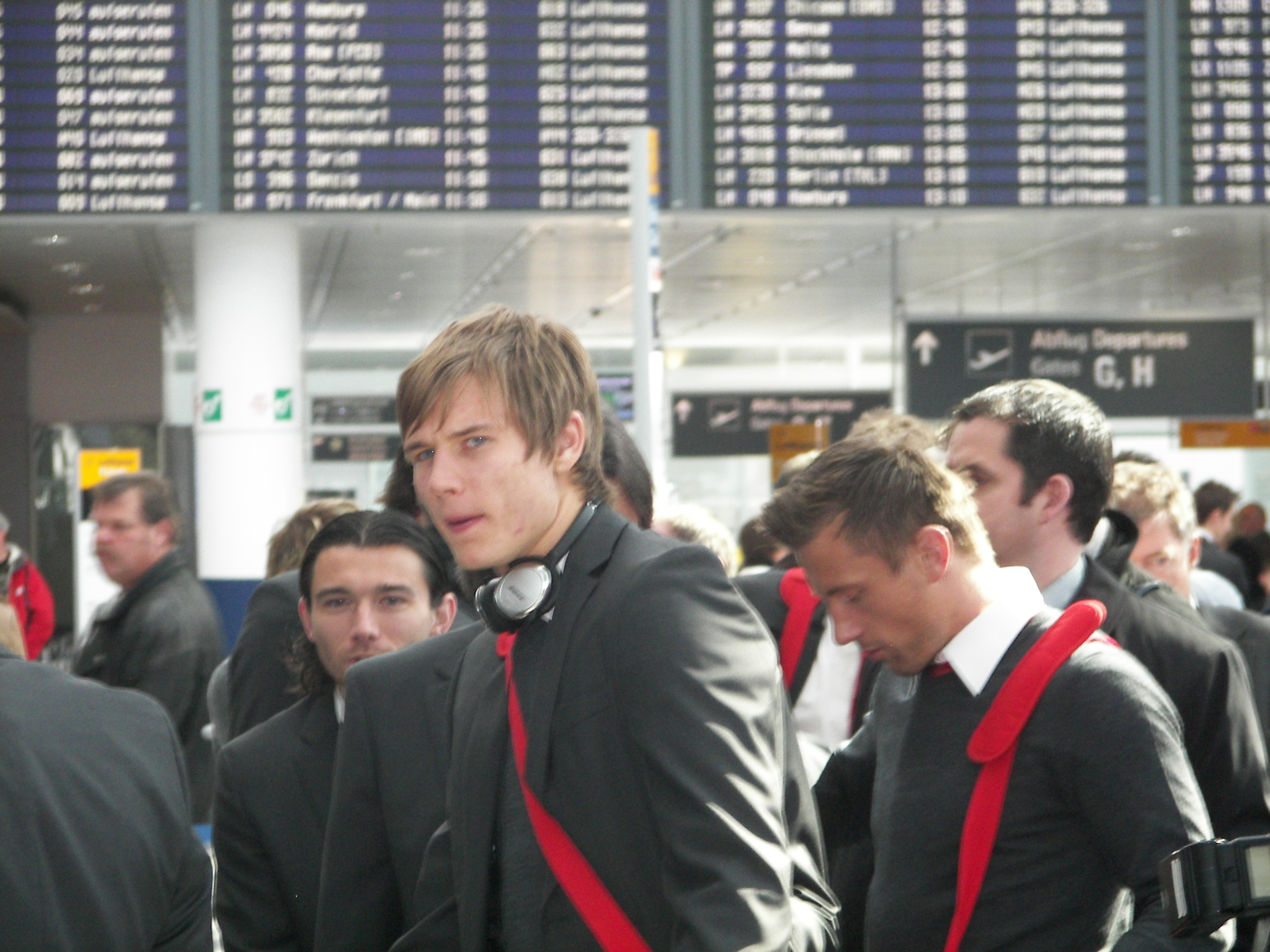 Holger Badstuber